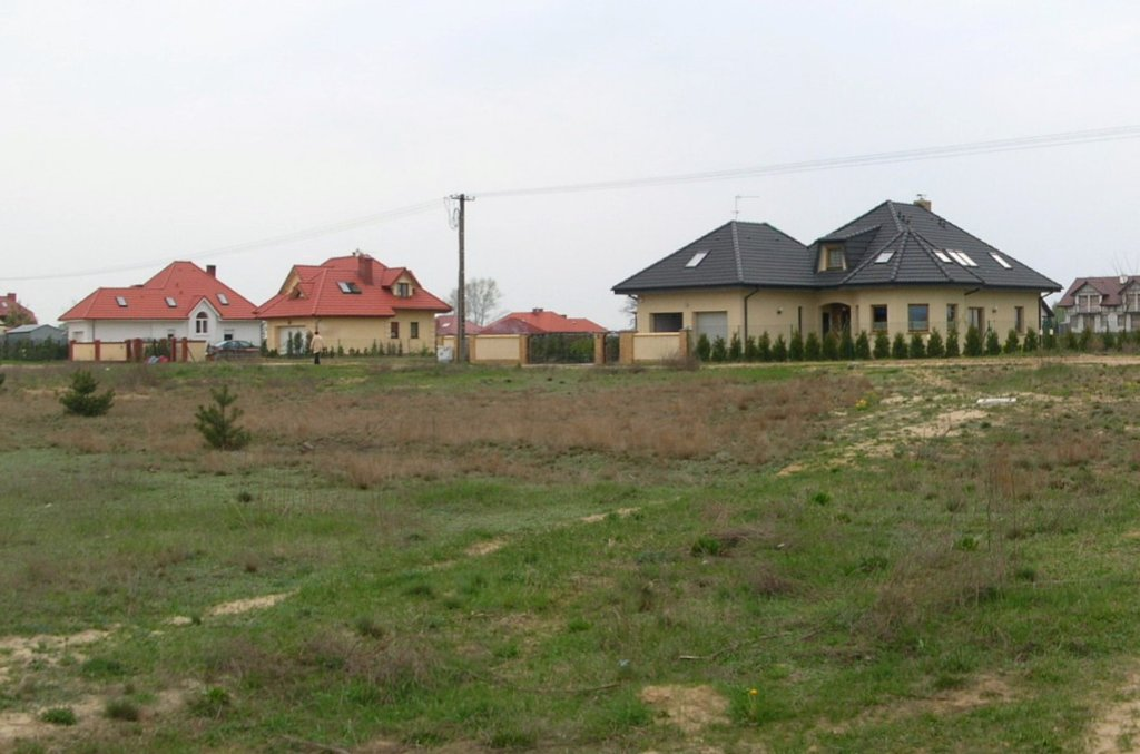 Zabudowa podmiejska w Niemczu, gm. Osielsko koło Bydgoszczy